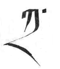 карата умэ